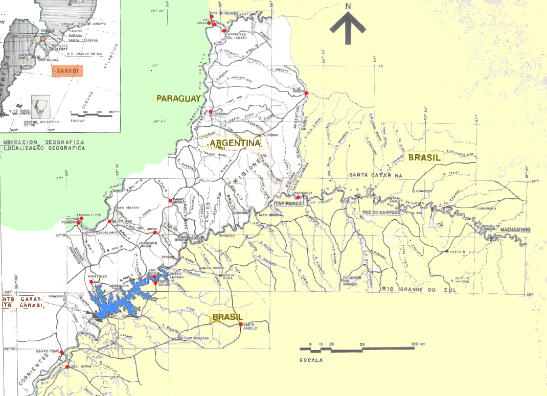 mapa de la futura represa de garabí